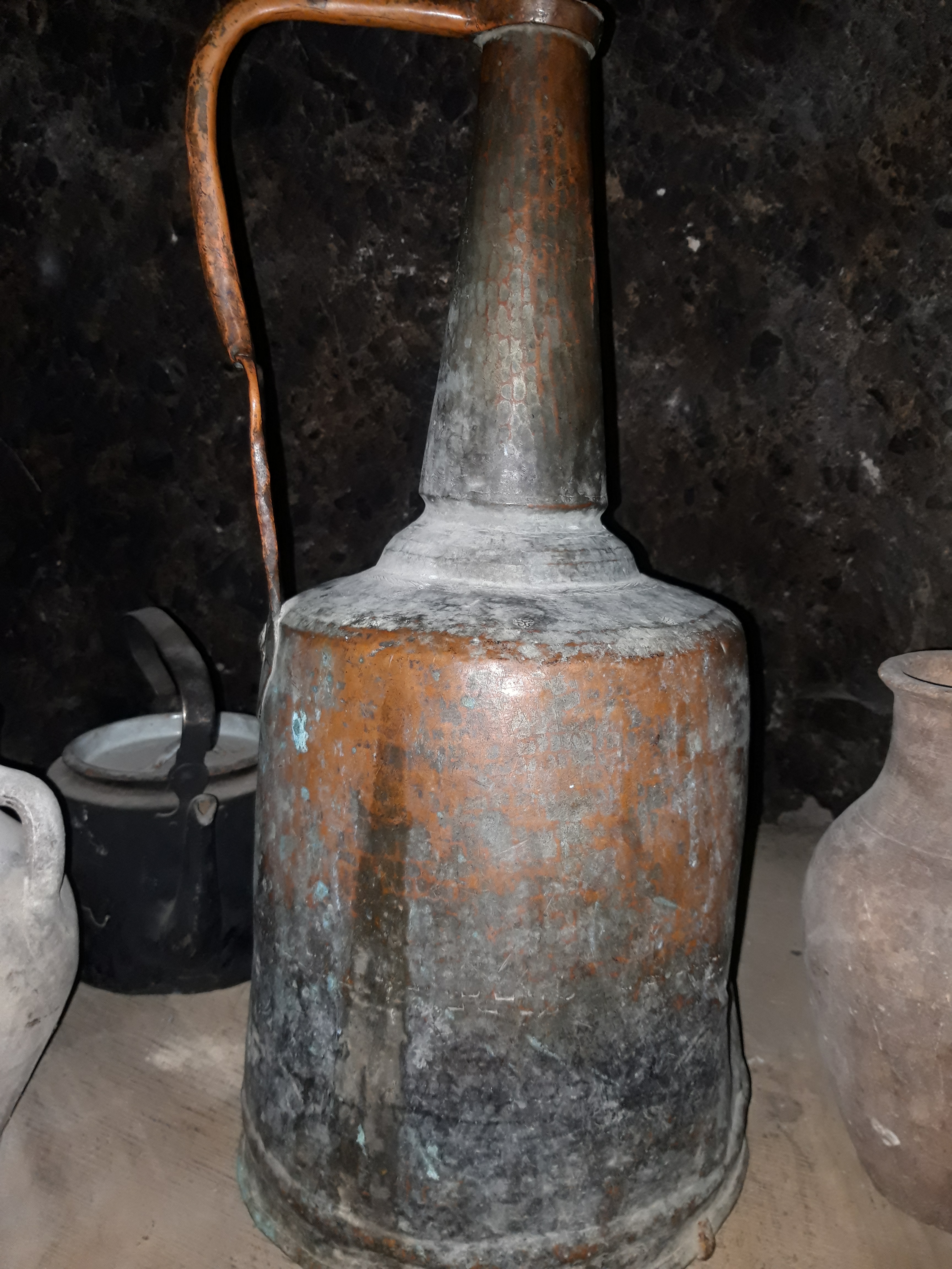 Կուժ, ջուր, գինի, հյութ, թան և այլ ըմպելիք պահելու համար